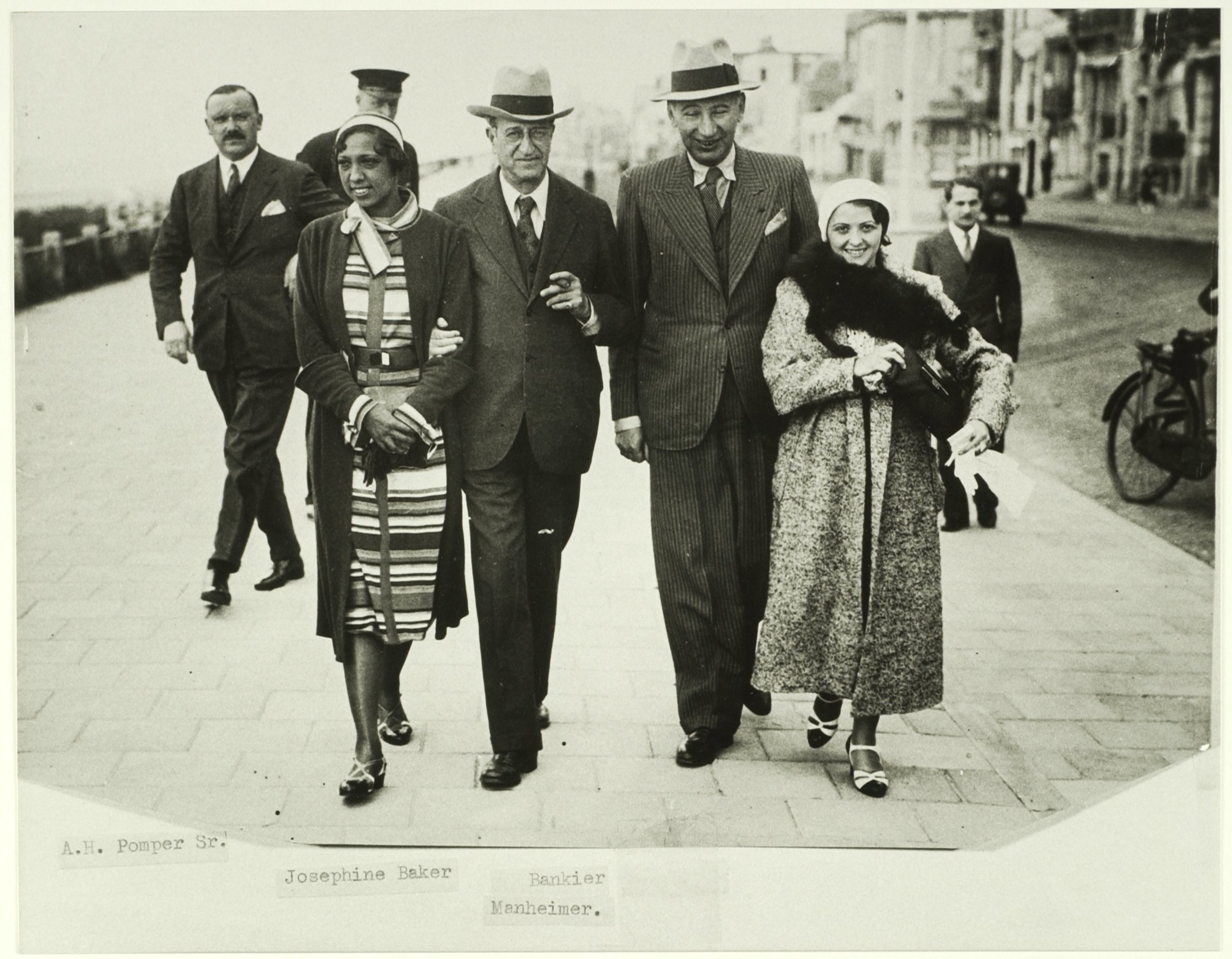 CollectieCollectie Fotoburo de BoerInventarisnummerNL-HlmNHA_5400468000 BeschrijvingJosephine BakerFotonummerNL-HlmNHA_5400468000DocumenttypeHistorieprenten, tekeningen en foto'sVervaardigerBoer, Cees de (1918-1985) LandNederland ProvincieNoord-Holland GemeenteZandvoort PlaatsZandvoort Begindatum1932Einddatum1932TechniekFoto Plaatsinggb74